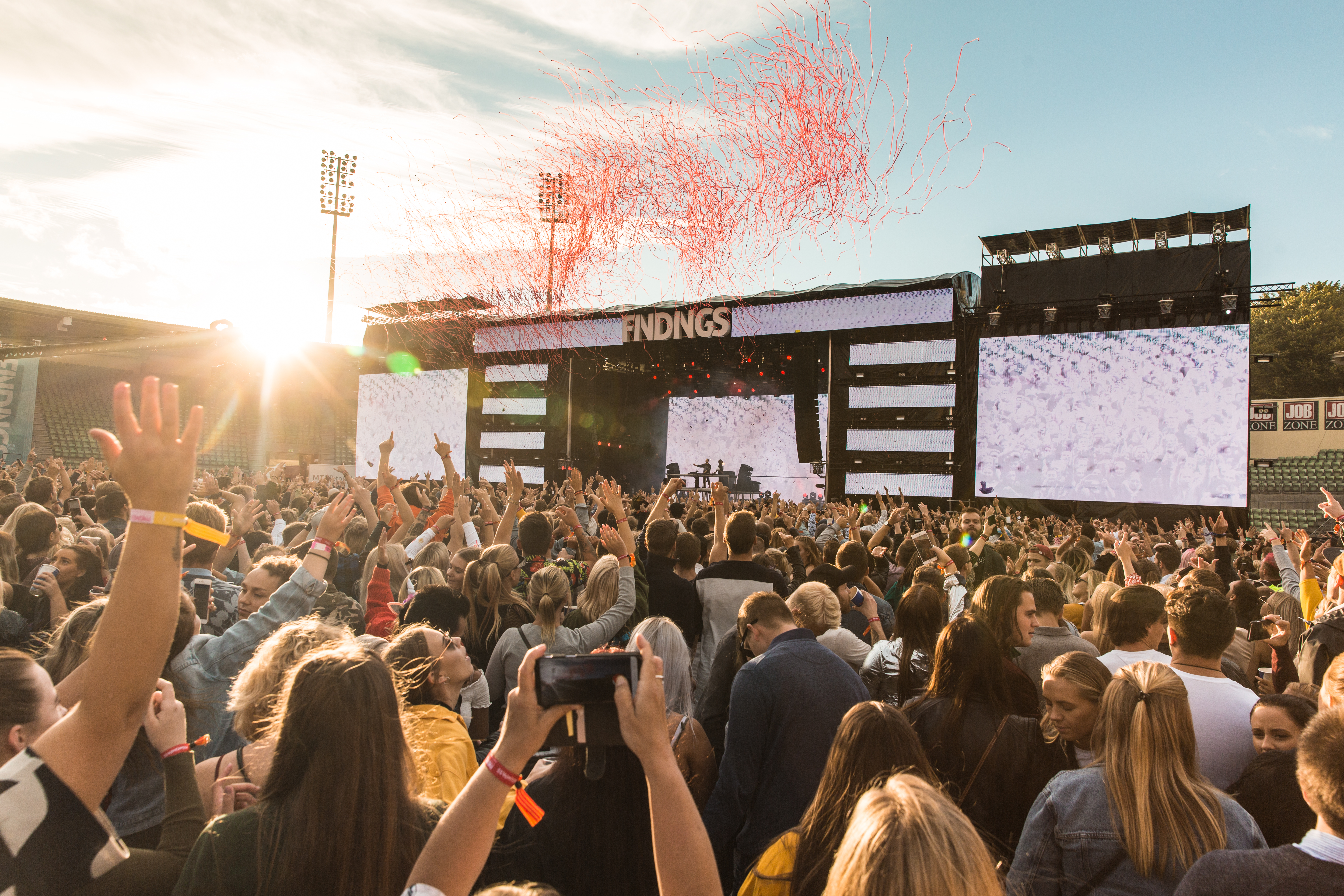 Axwell Λ Ingrosso på Findings Festival 2018